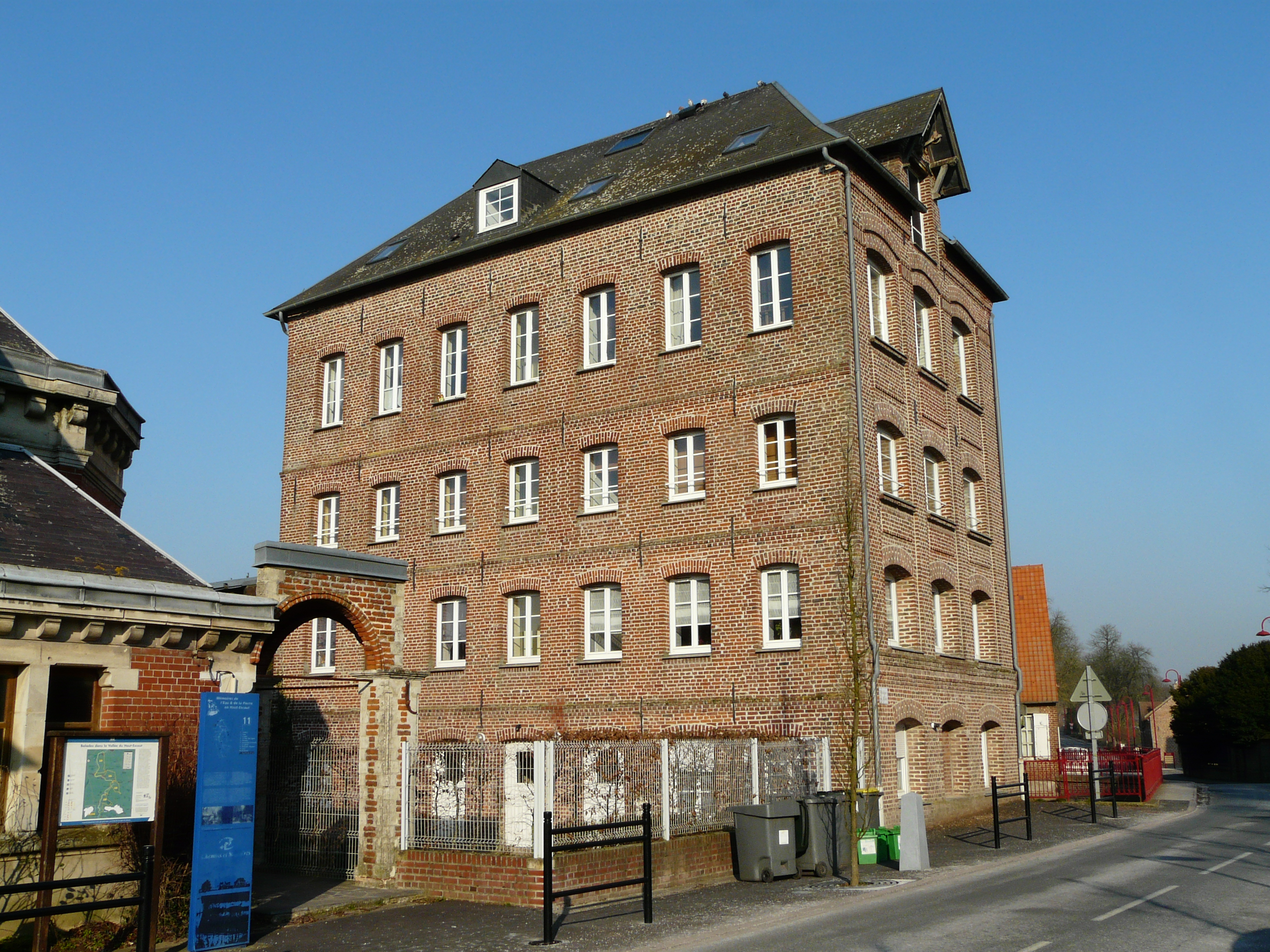 L'ancien moulin de Noyelles-sur-Escaut